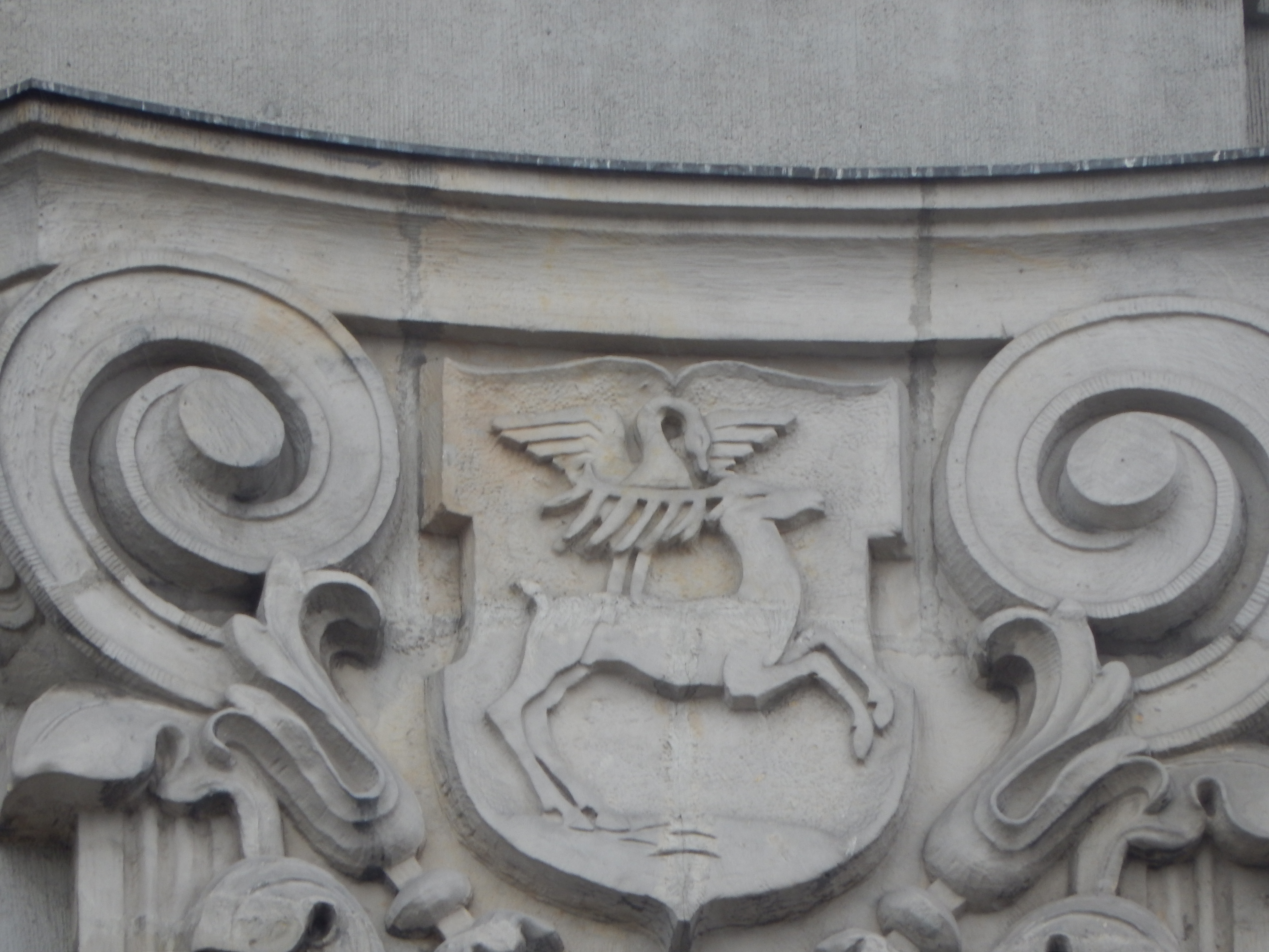 Fragment elewacji gmachu Sejmu Śląskiego - herb Bierunia